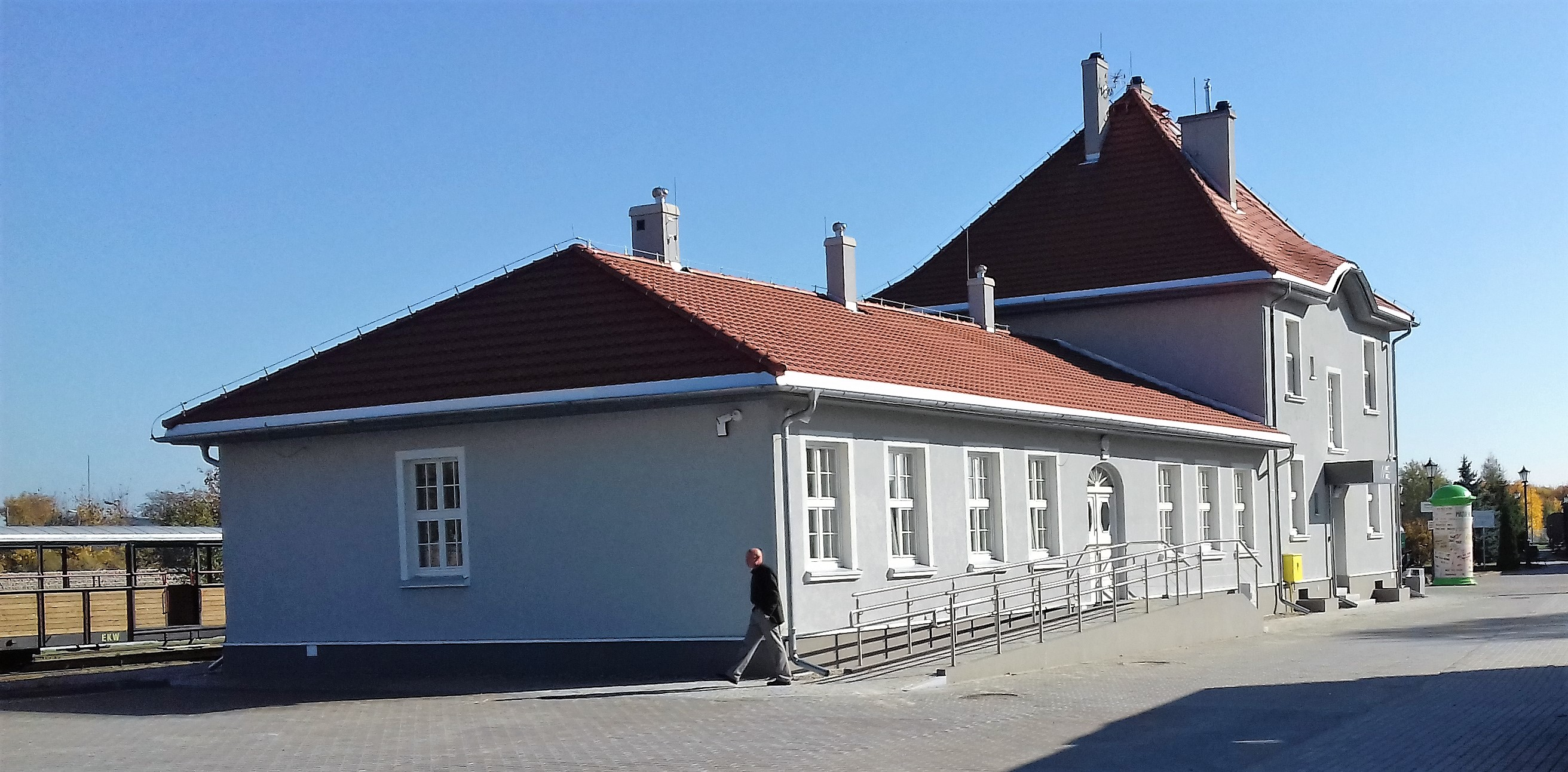 Dworzec stacji Ełk Wąskotorowy. Siedziba Muzeum Historycznego w Ełku przy ulicy Wąski Tor 1.